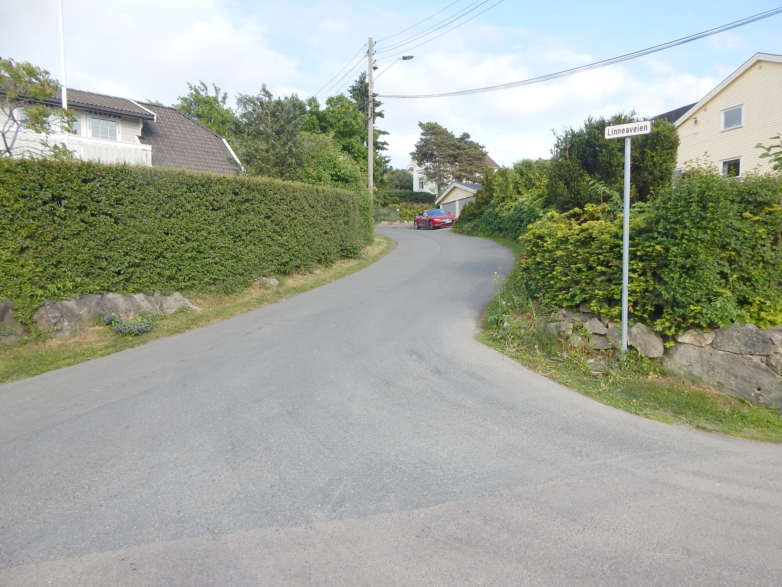 Linneaveien sett fra Simensbråtveien